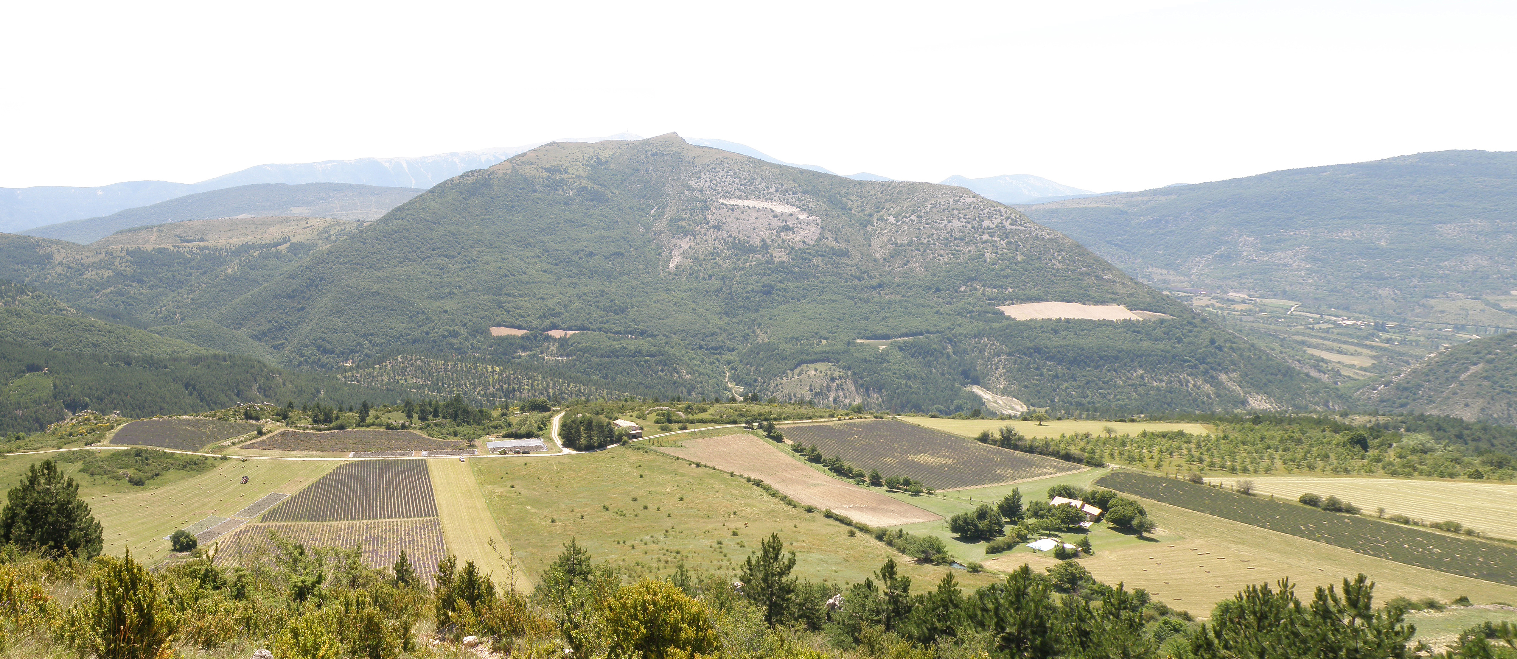 Le Poët-en-Percip (Drôme, France). Lieu-dit le Coup d'Huery à l'avant-plan, sis au nord du vieux bourg. Champs de lavande, récolte en cours. Au centre, versant nord de la montagne de Banne (alt. 1382 m.). Au loin, à l'horizon, la masse oblongue du mont Ventoux (alt. 1911 m.). Nous regardons vers le sud-ouest.